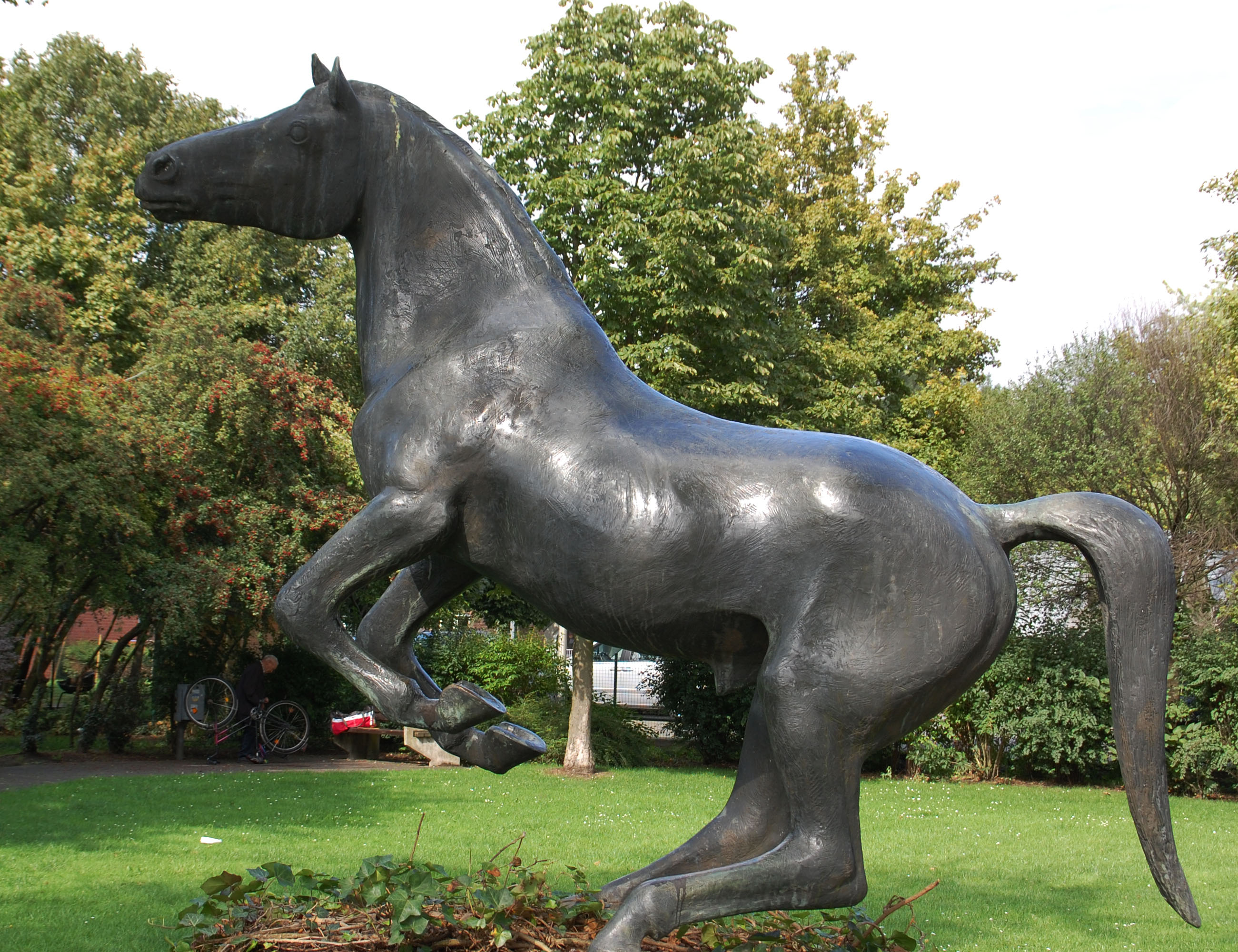 Denkmal Springendes Pferd in Quadrath-Ichendorf, Bergheim